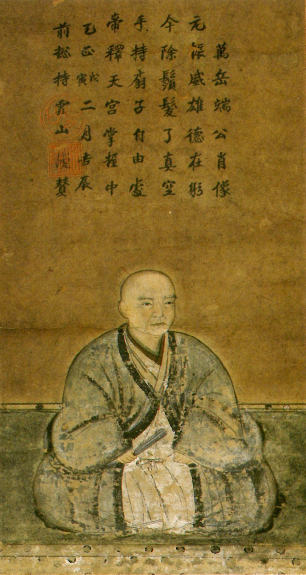 梶川高秀の肖像。